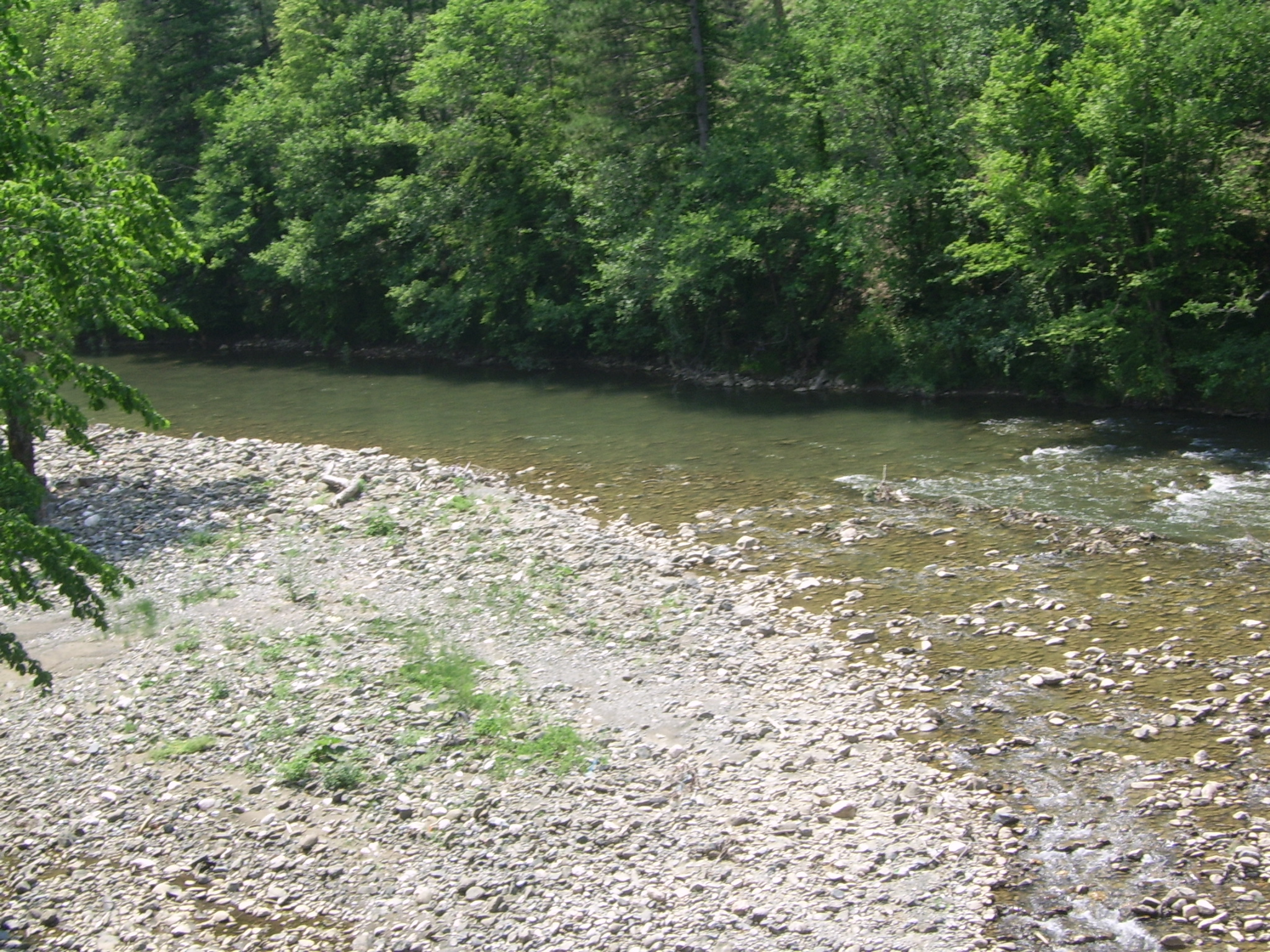 Rastoka kod Careve Ćuprije